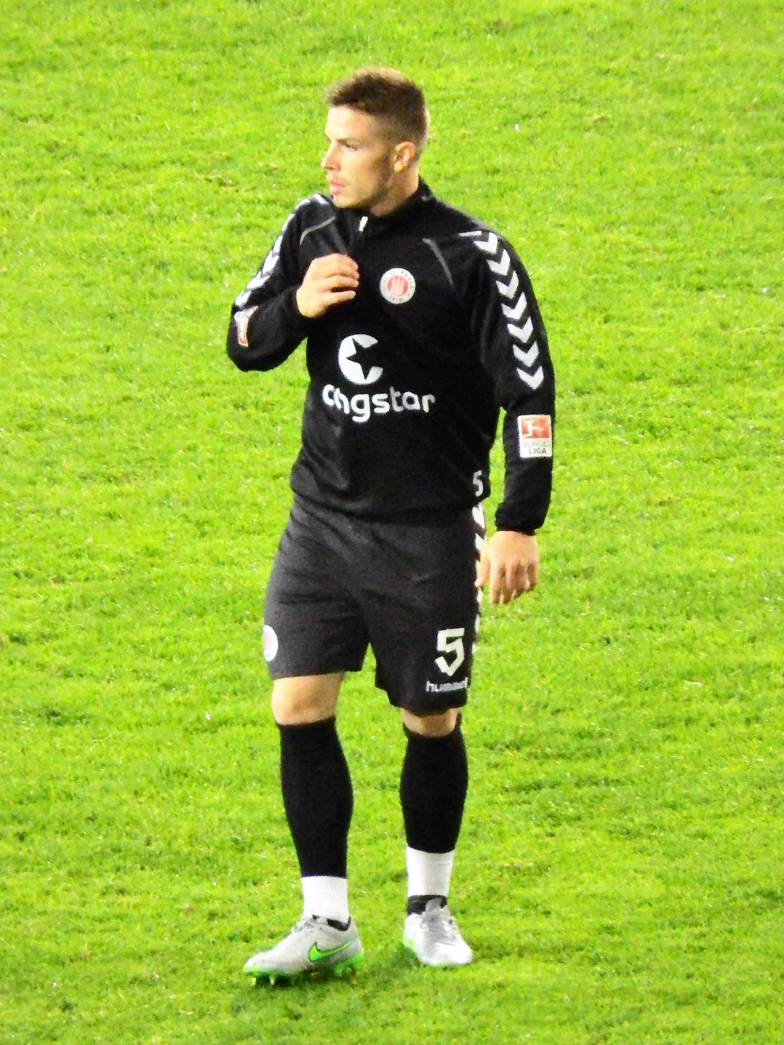 Keller, Joël FCSP